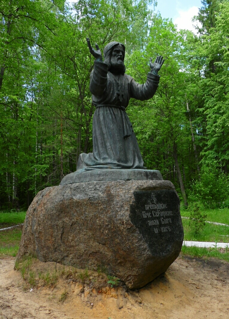 место, где находился камень преподобного Серафима Саровского: юго-восточная окраина города, по дороге на Протяжку, Саров, Нижегородская область